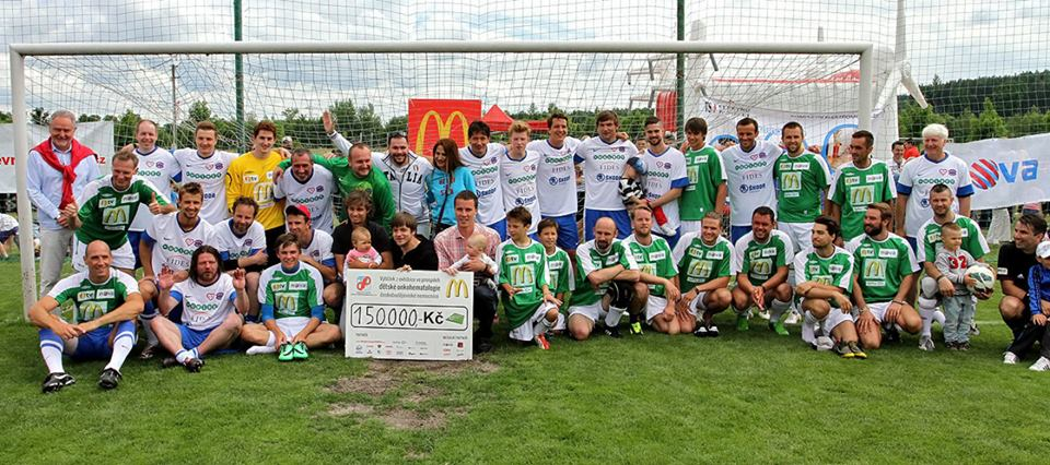 Výtěžek 150.000Kč věnováno dětskému oddělení budějovické nemocnice.